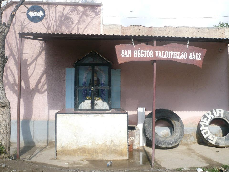 Ermita - santuario popular dedicado a San Héctor Valdivielso